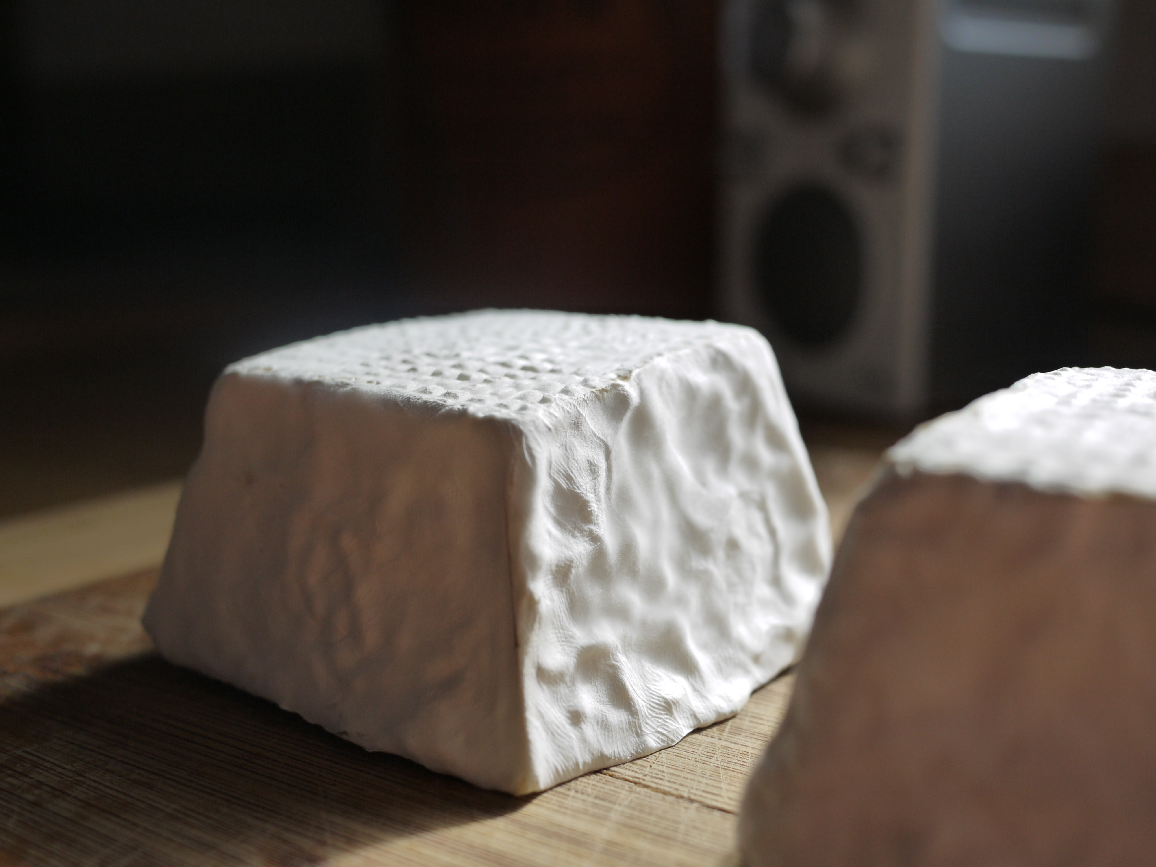 Le fromage de chèvre Tournon-saint-pierre.